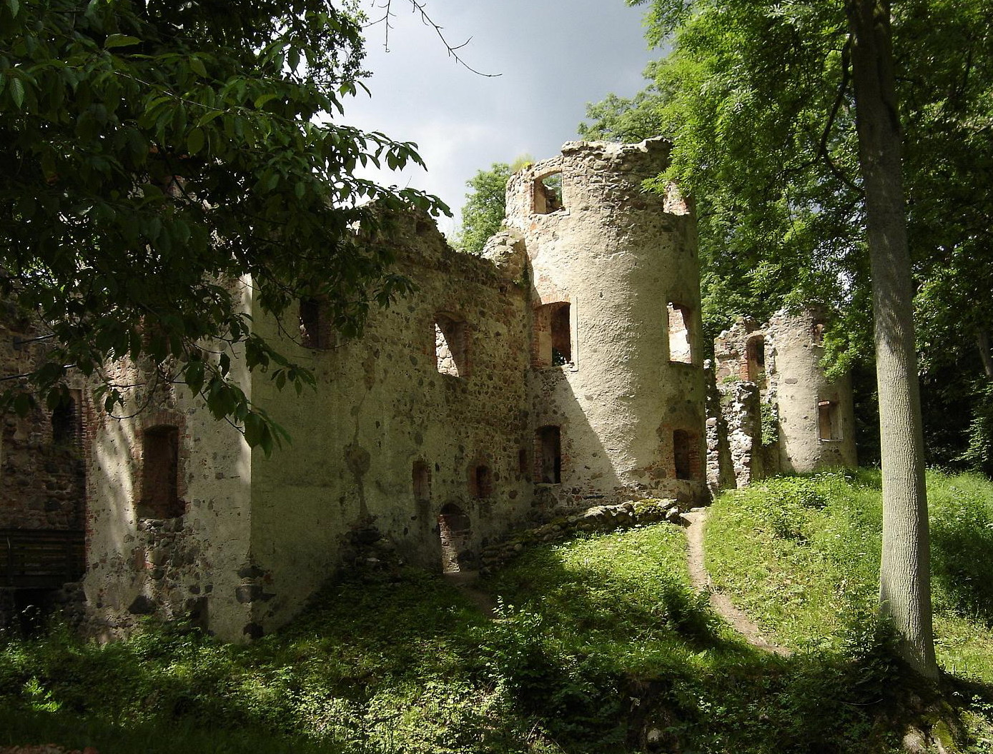 Burgruine Landskron (Ostvorpommern)